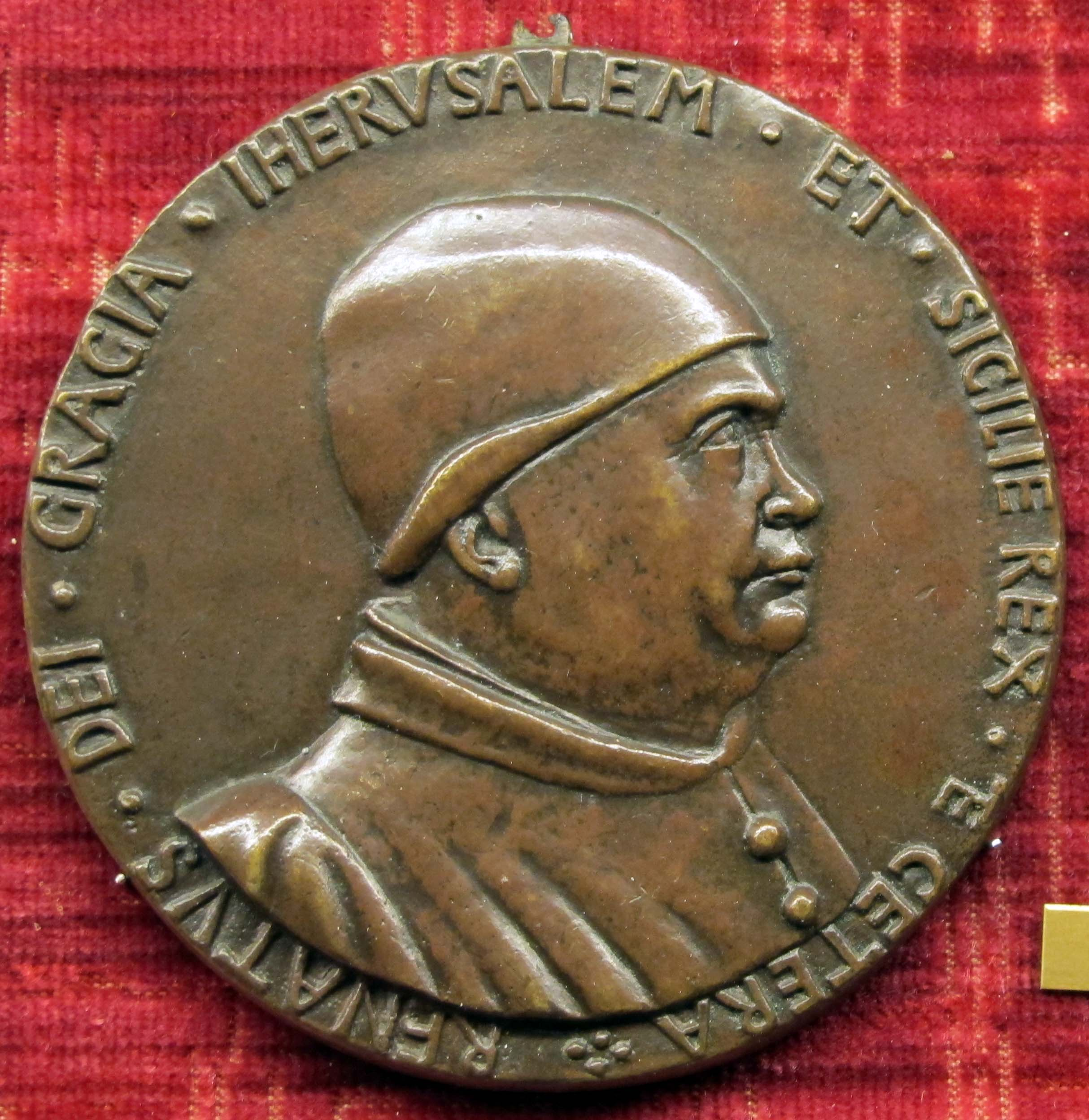 Medaglia di Renato d'Angiò, 1461